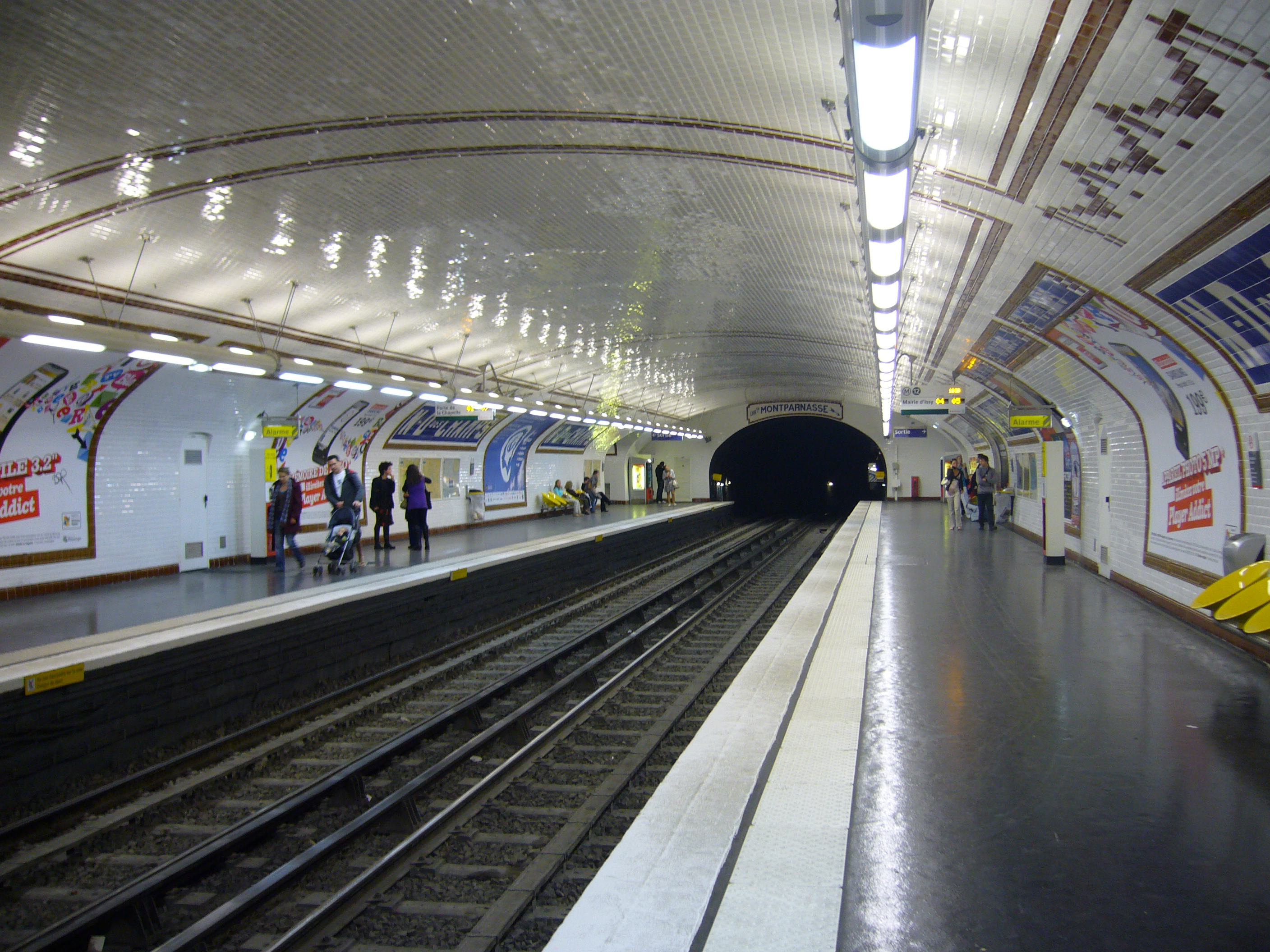 Station Notre-Dame-des-Champs sur la ligne 12 du métro de Paris.